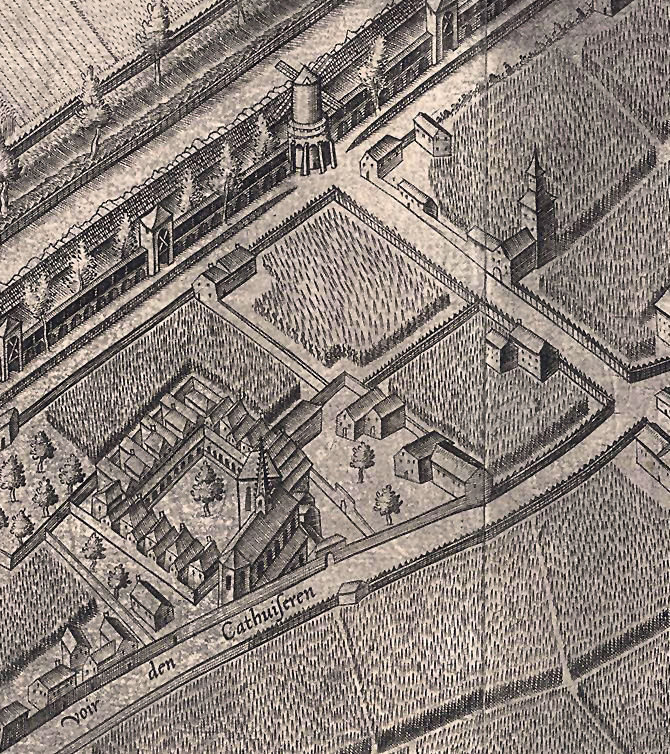 Ausschnitt des Mercator - Stadtplanes, Bereich Ulrepforte.